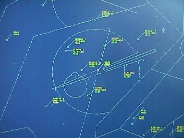 eigen foto Ben Pirard